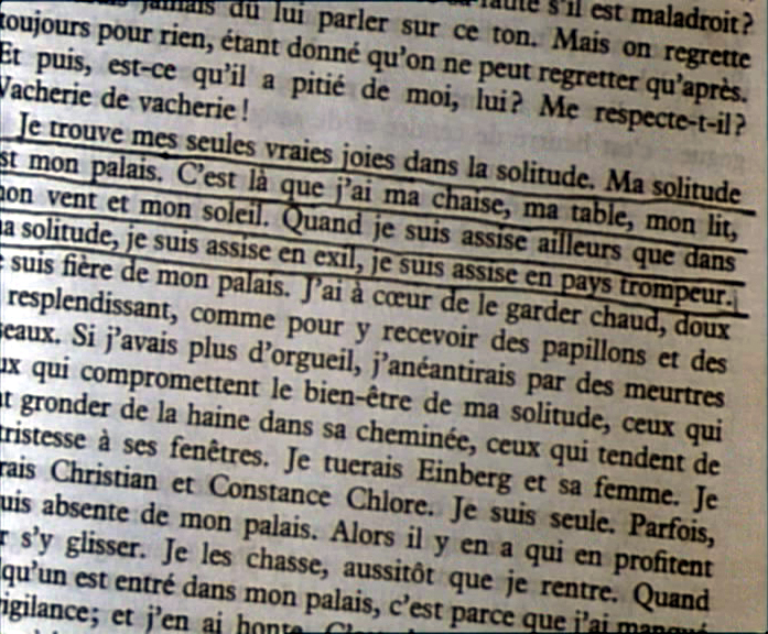 Auszüge-meine Einsamkeit...